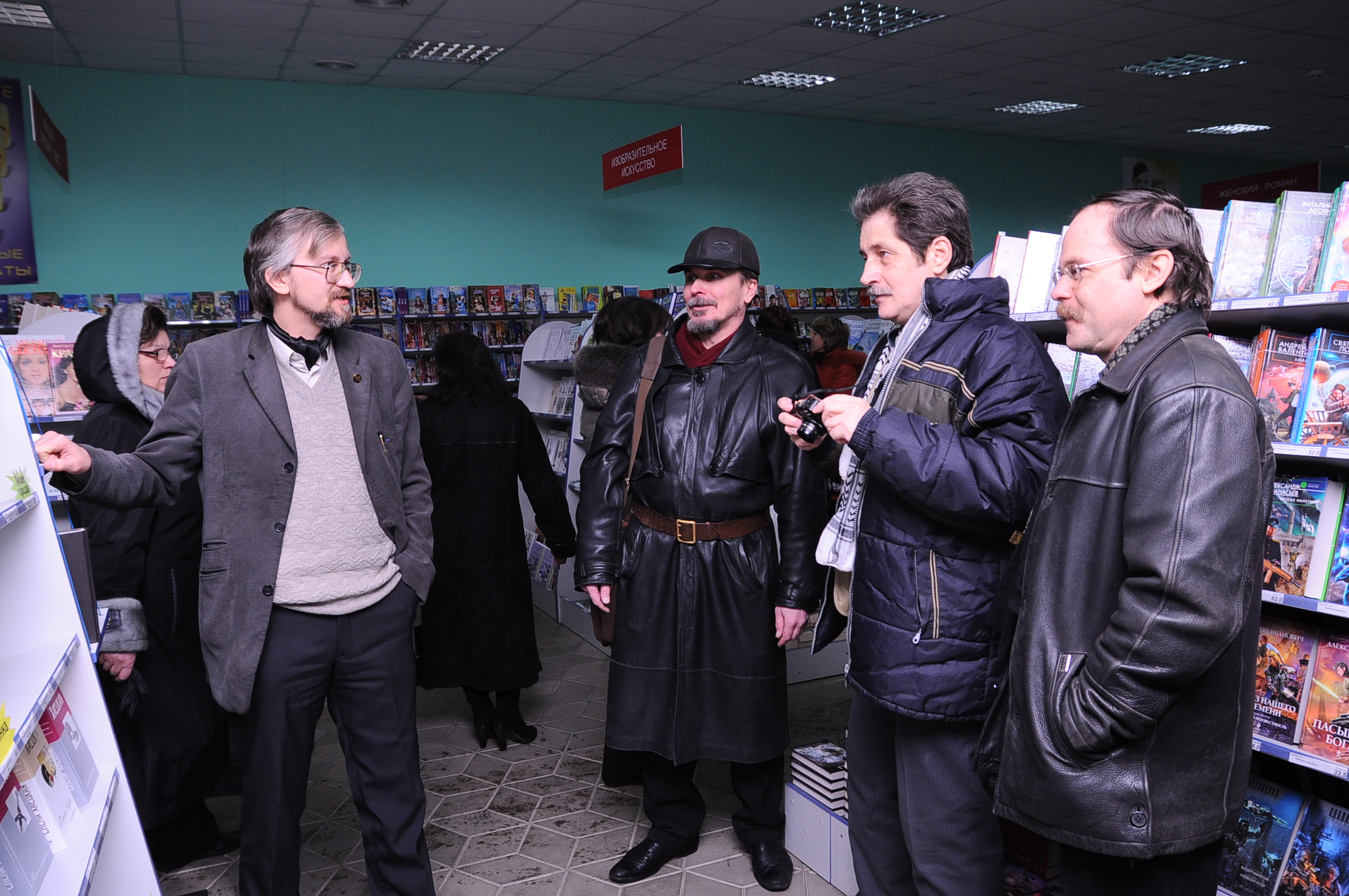 Донецк. Встреча с донецкими писателями-фантастами и афтограф-сессия.